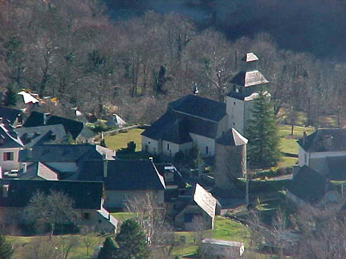 Le village vu depuis le col d'Arras